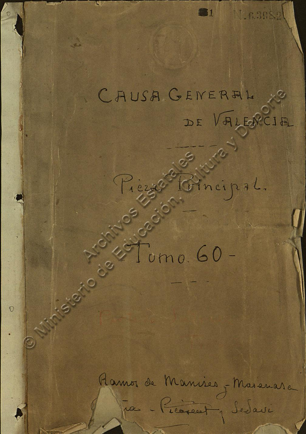 Documentos correspondientes a Causa General del A.H.N. Subdirección General de los Archivos Estatales. Ministerio de Cultura.España Manises (Valencia) Archivo Histórico Nacional,FC-CAUSA_GENERAL,1385,Exp.5 - 1